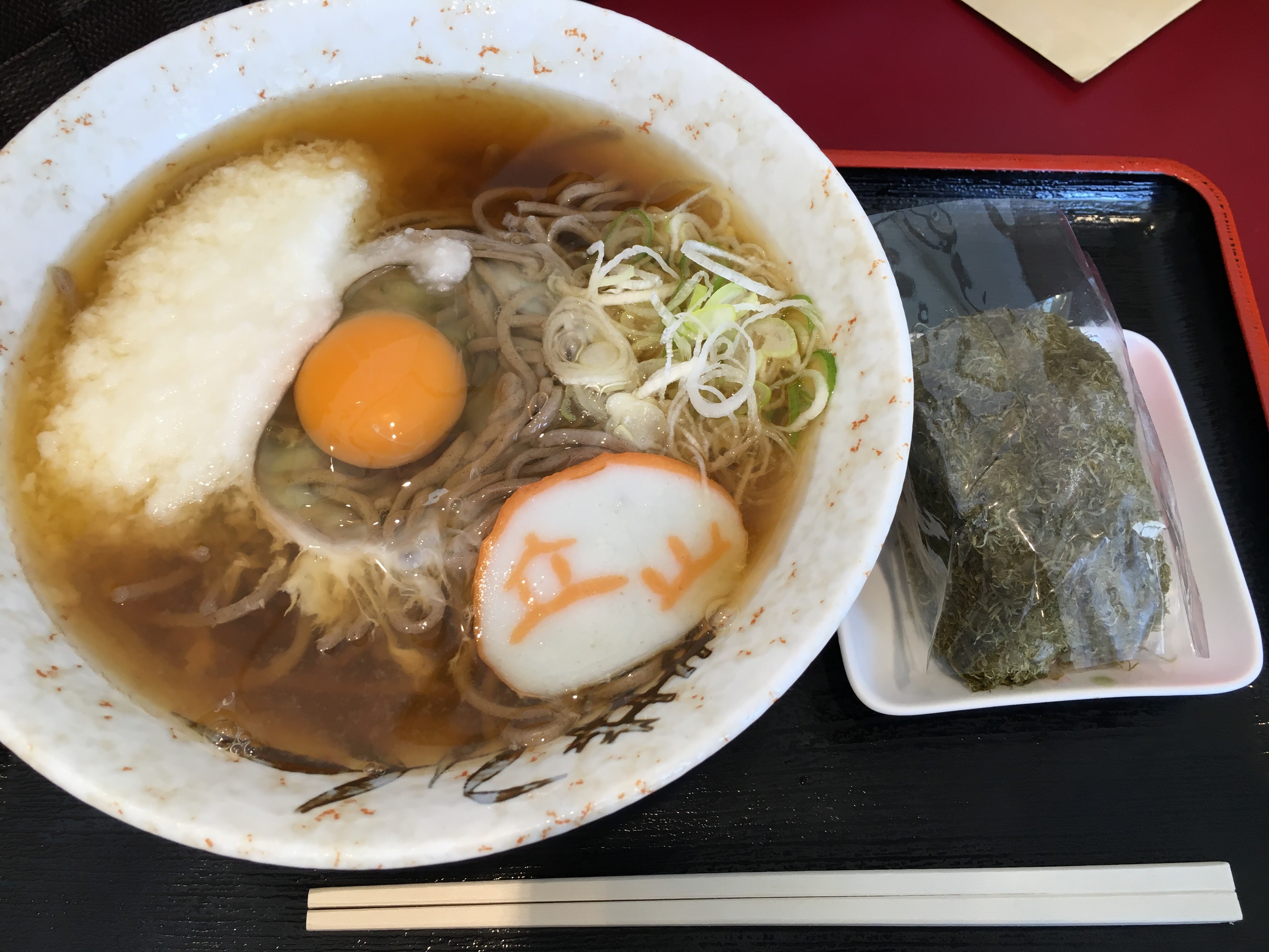 立山そばで食べたそばとおにぎり